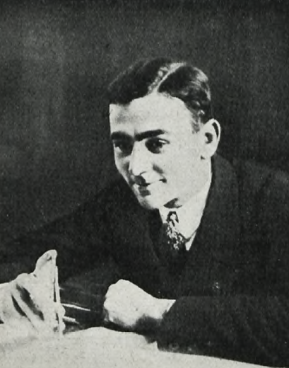 Adam Nowotny, polski inżynier i pilot